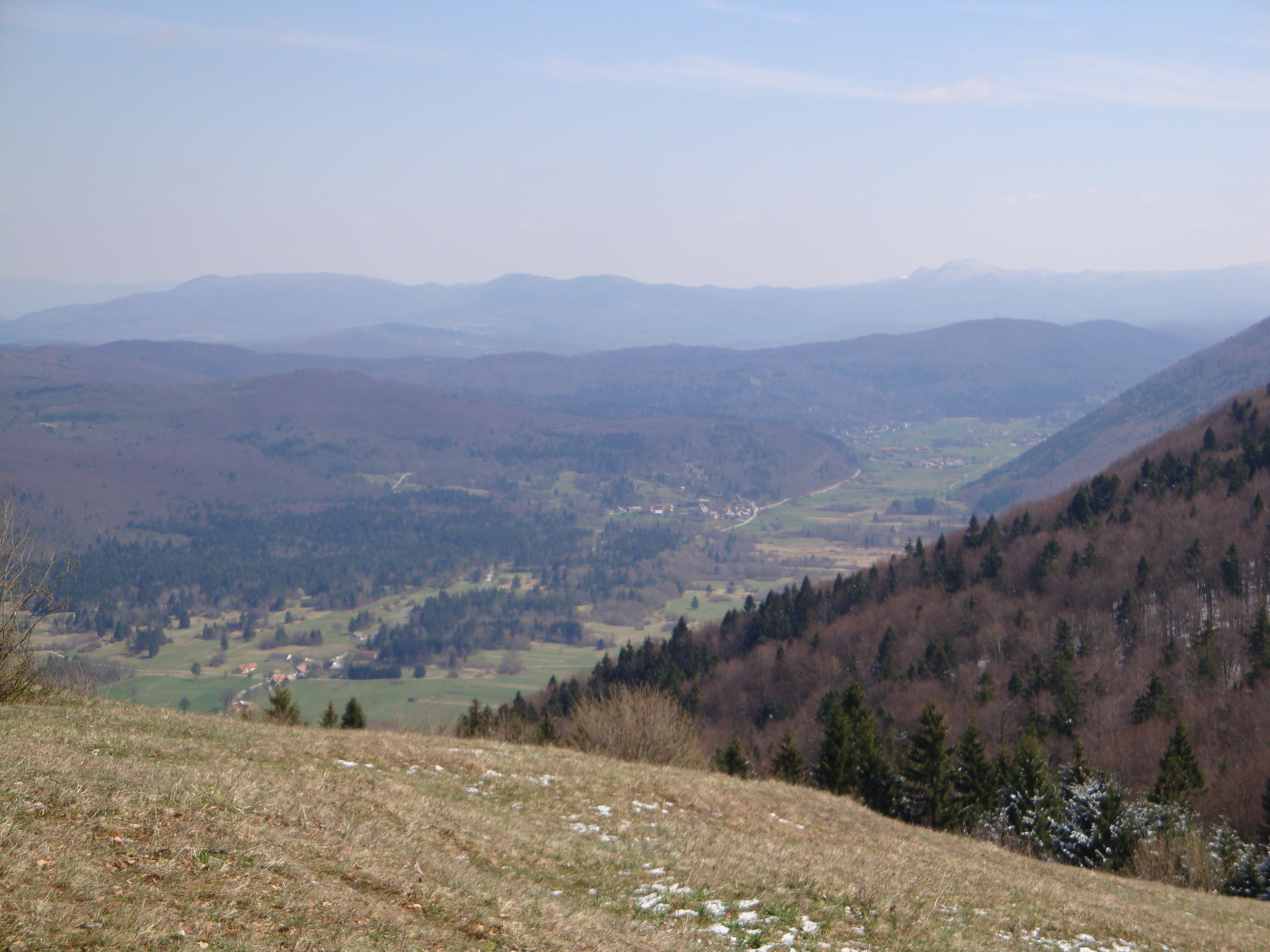 Struška dolina z Grmade nad Ortnekom